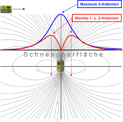 Feldlinienverlauf bei vertikal verschütteter Antenne. Darstellung der falschen Maxima bei 1- und 2-Antennen Geräten! Nur ein Maximum (=geringste Entfernungsanzeige) bei 3-Antennen-Geräten!